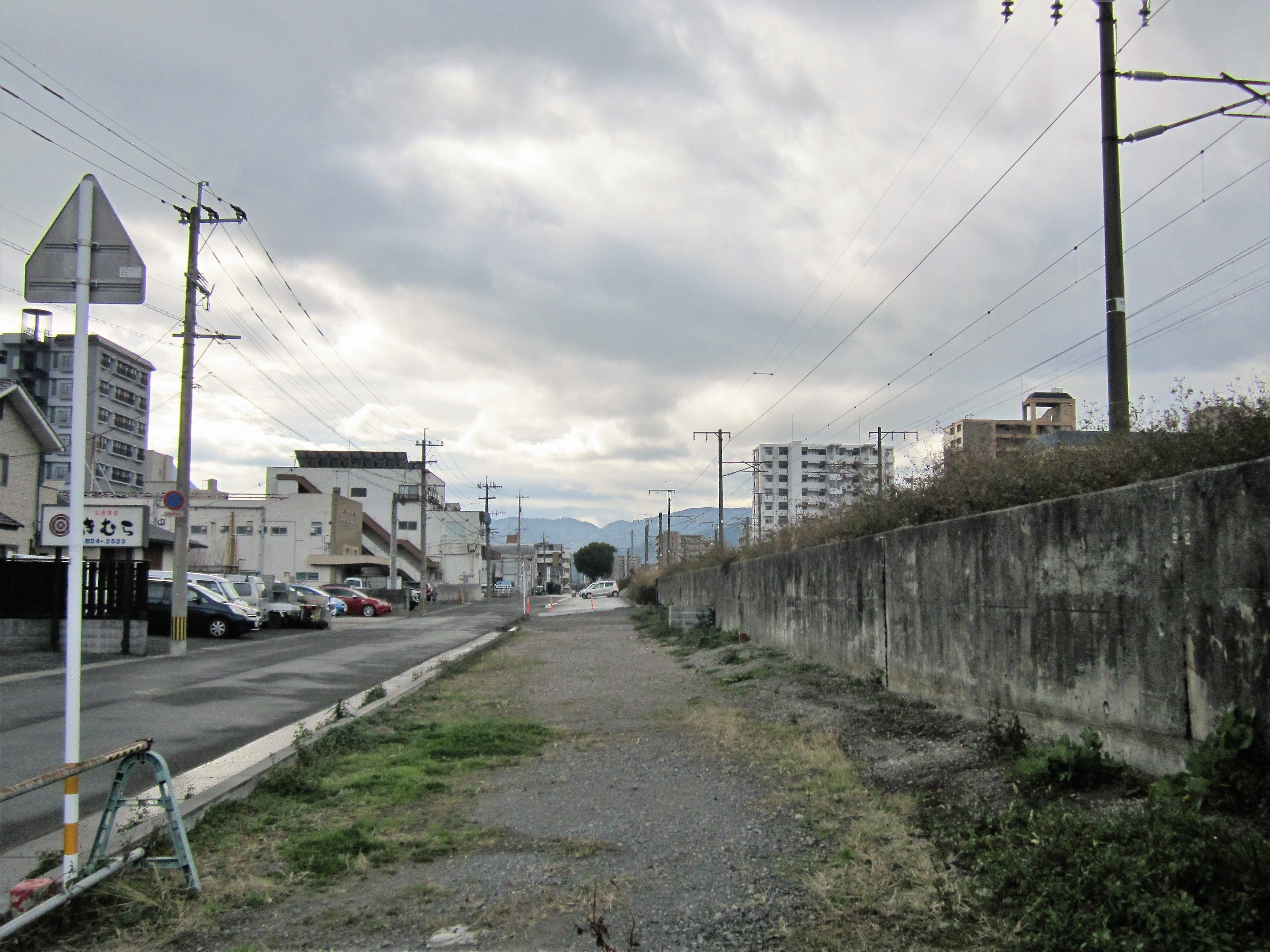 新別府駅予定地（観光港側、線路と側道の間に空間がある） Canon PowerShot A2200